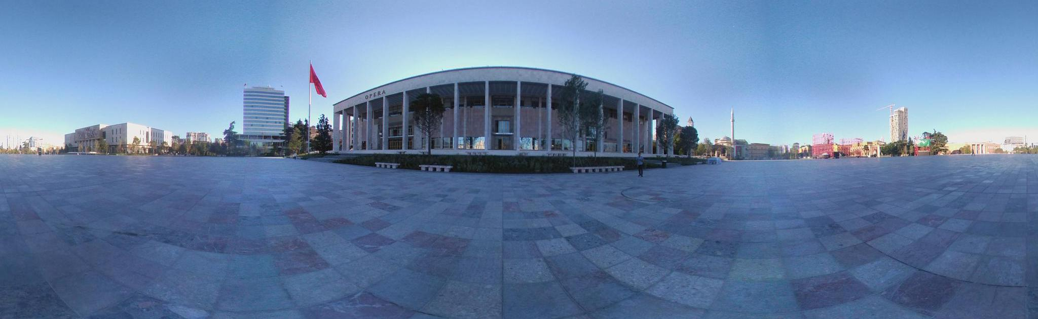 Skanderbeg Square Tirana 2017 3D